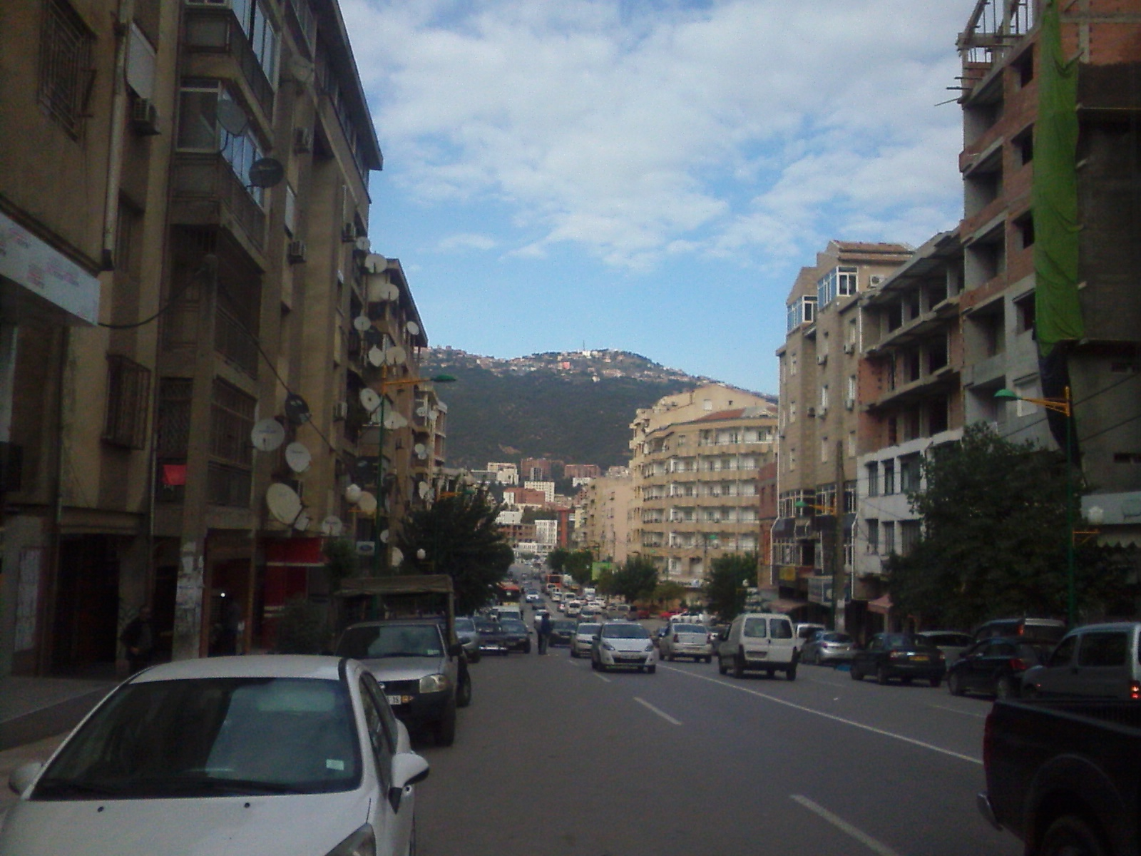 Boulevard Stiti Ali en plein cœur de la ville de Tizi Ouzou, Algérie.